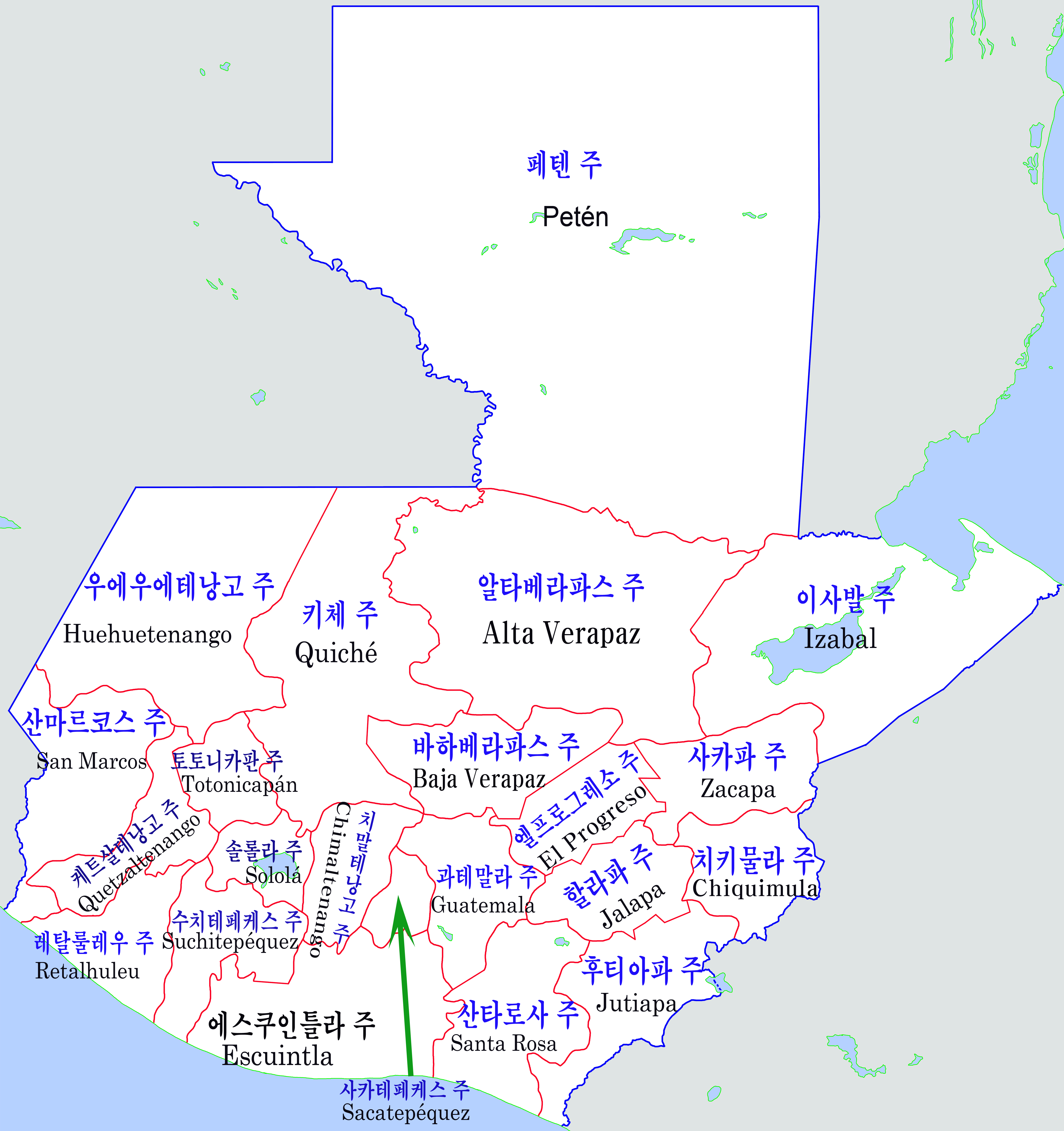 과테말라 행정구역